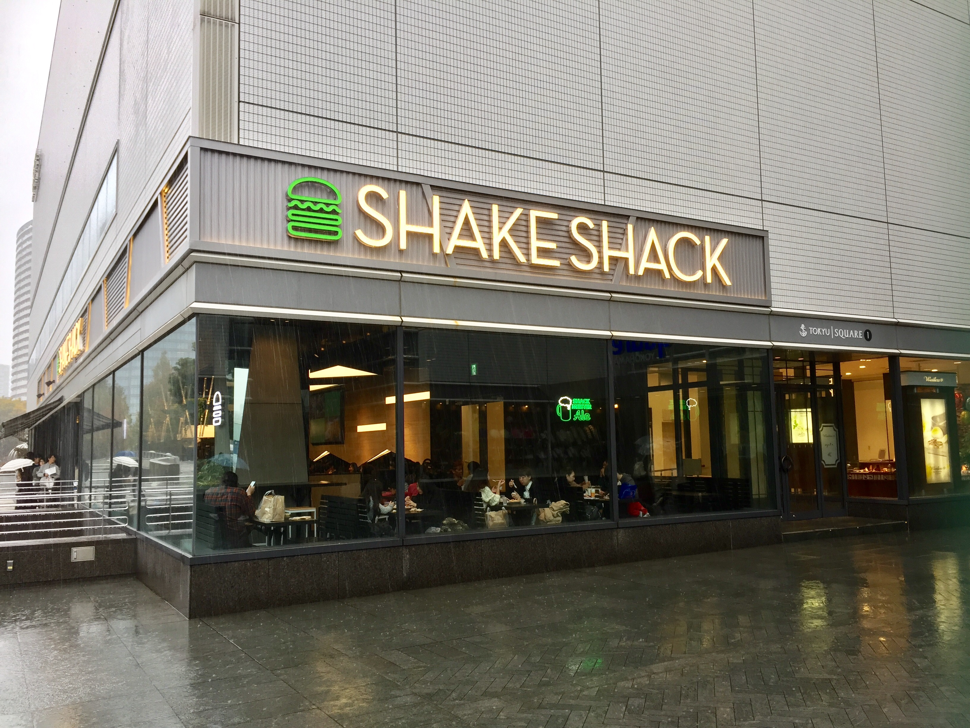 みなとみらい東急スクエア①のテナント。神奈川県初出店のハンバーガーチェーン「シェイク・シャック」。